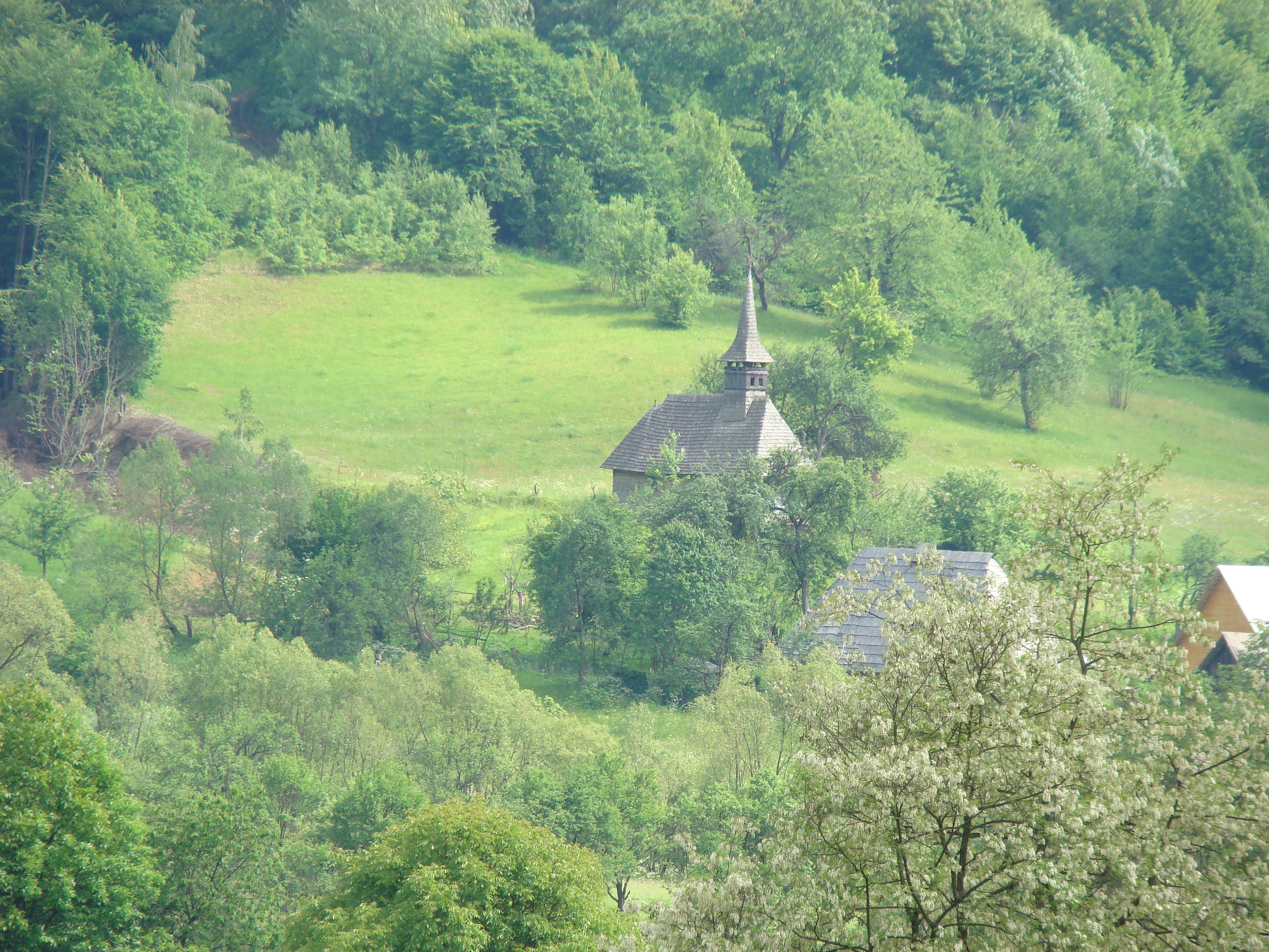 Biserica de lemn "Sf. Ioan Evanghelistul" , sat IZVOARELE; comuna CERNEŞTI